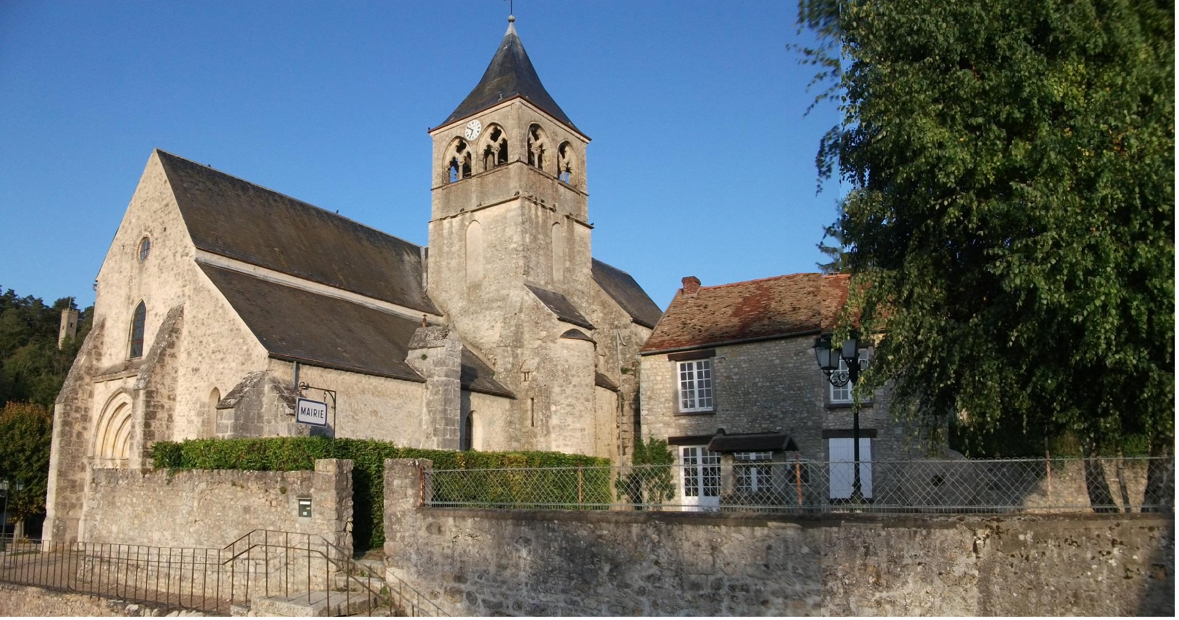 église et mairie de Boissy-la-Rivière.